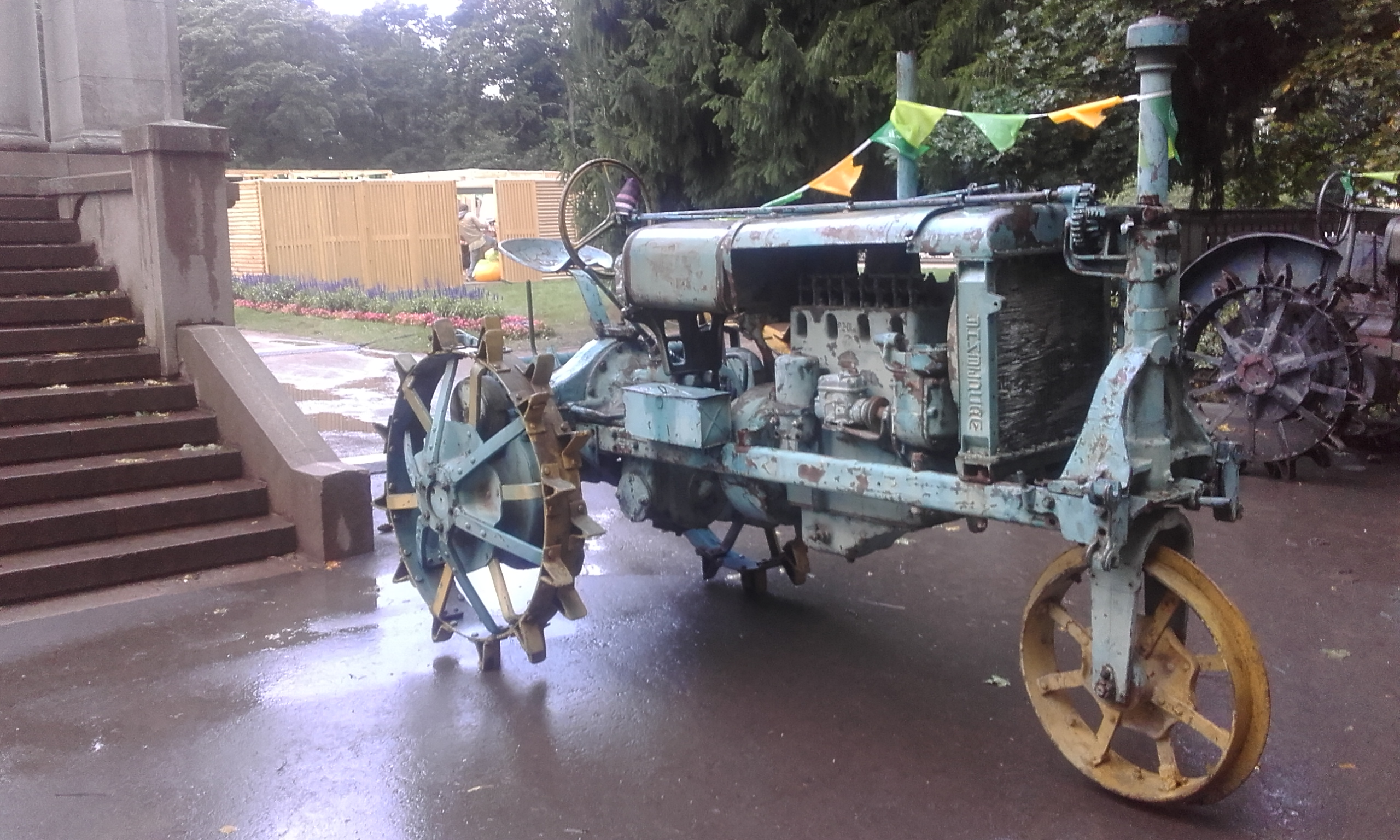 Трактор на выставке в Архангельском